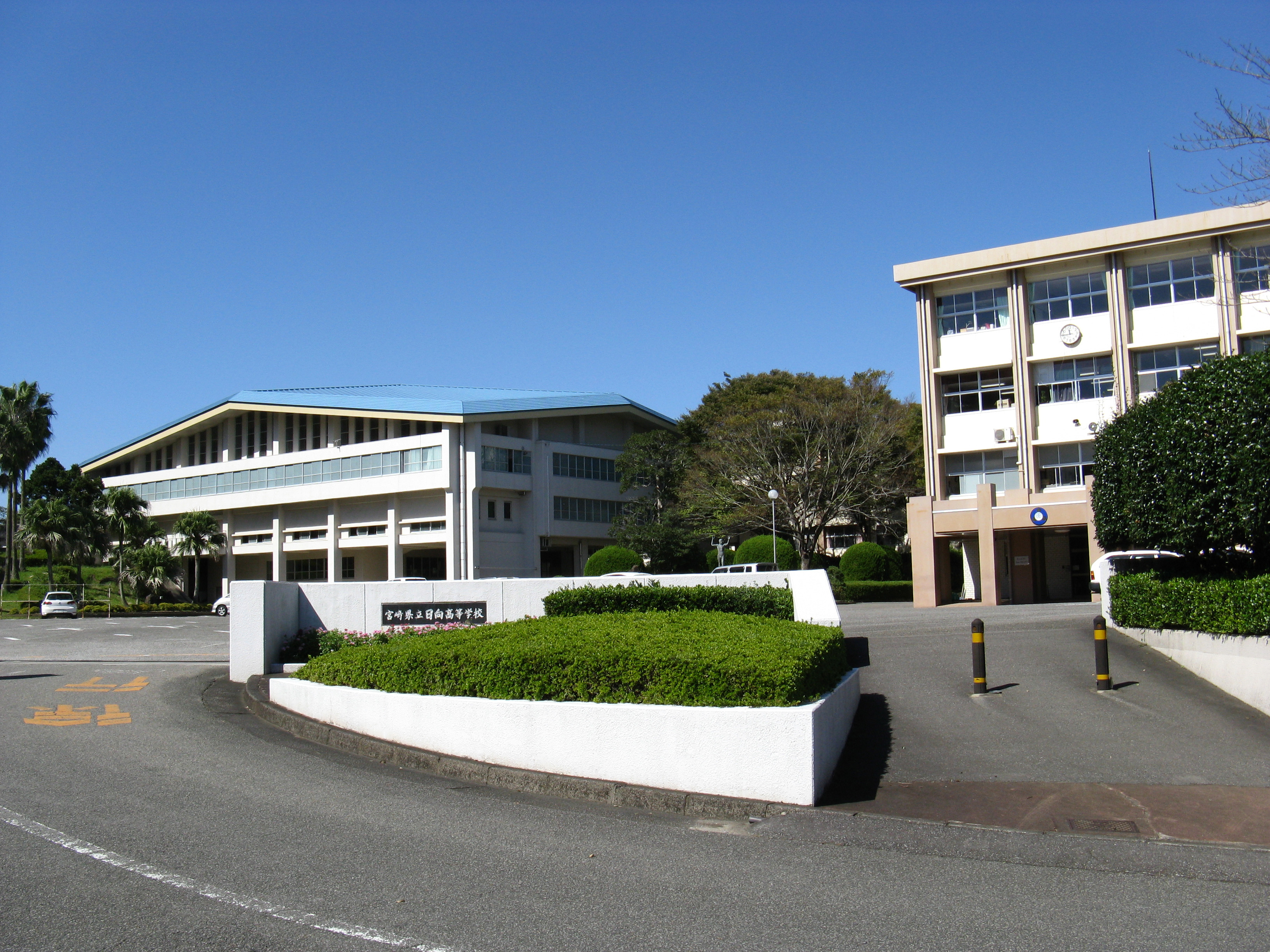 宮崎県立日向高等学校の正門付近。左が体育館、右が管理棟。